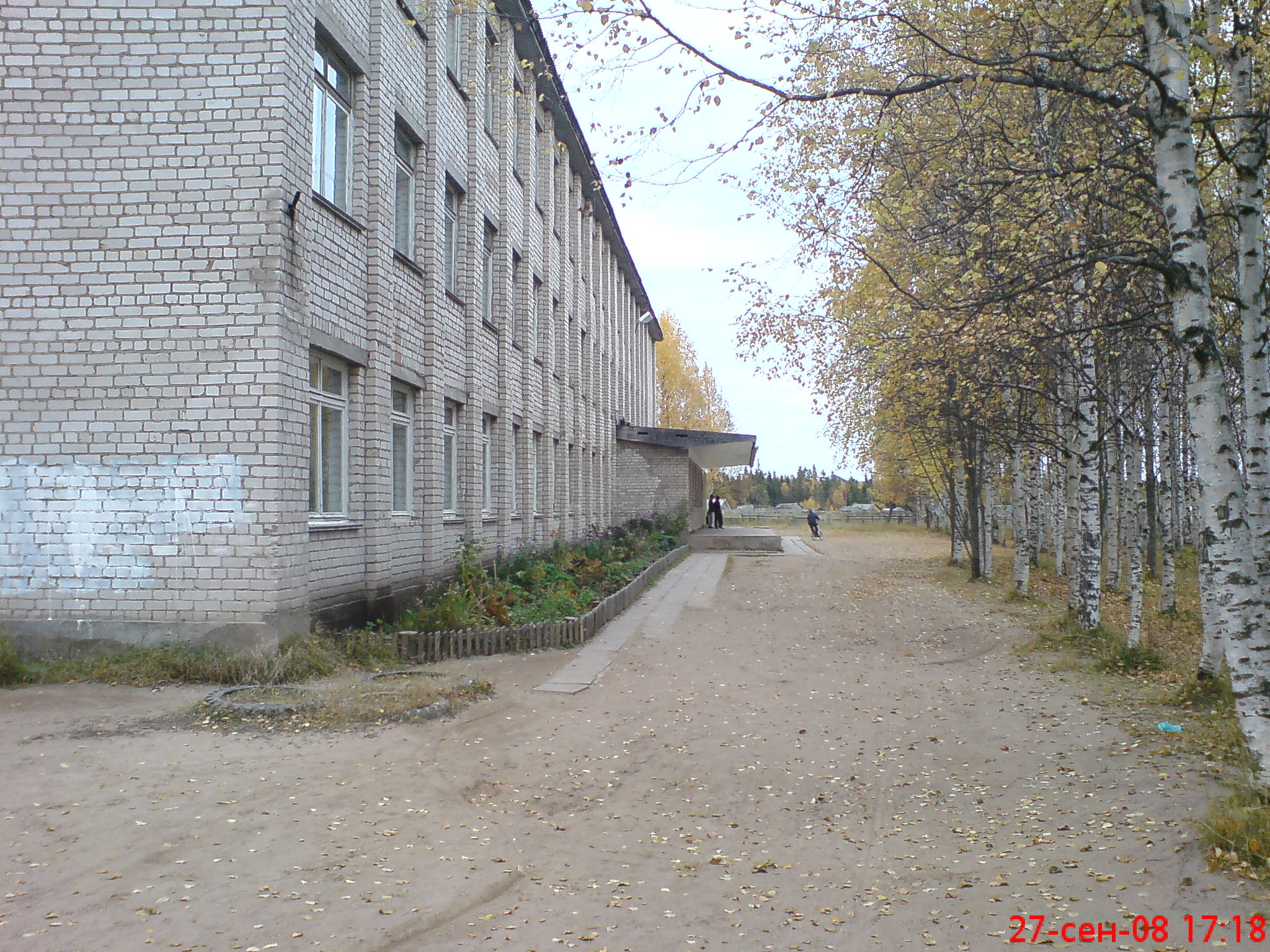 Здание Луковецкой средней школы в посёлке Луковецкий.